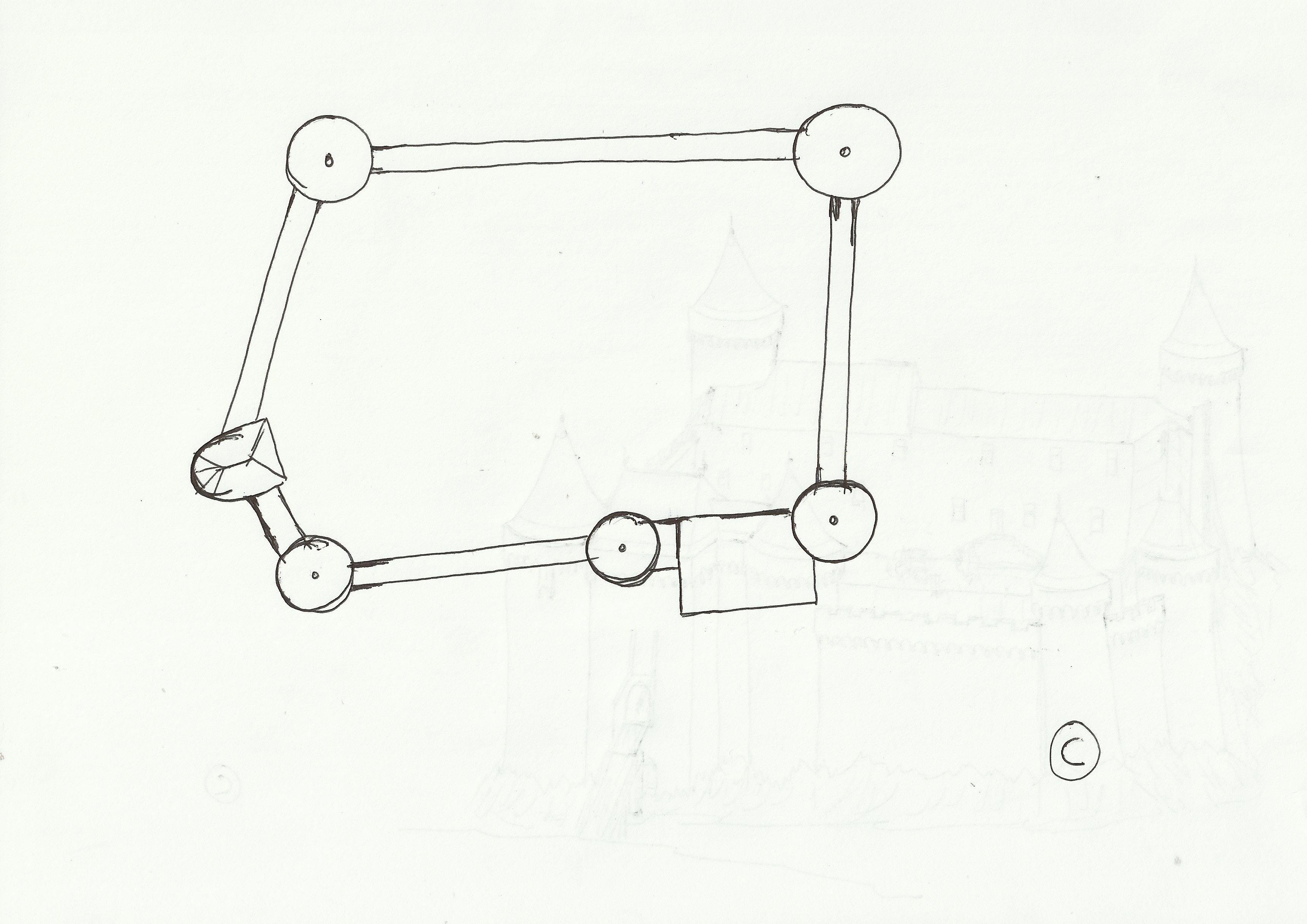 Plan possible du château fort de Machecoul.